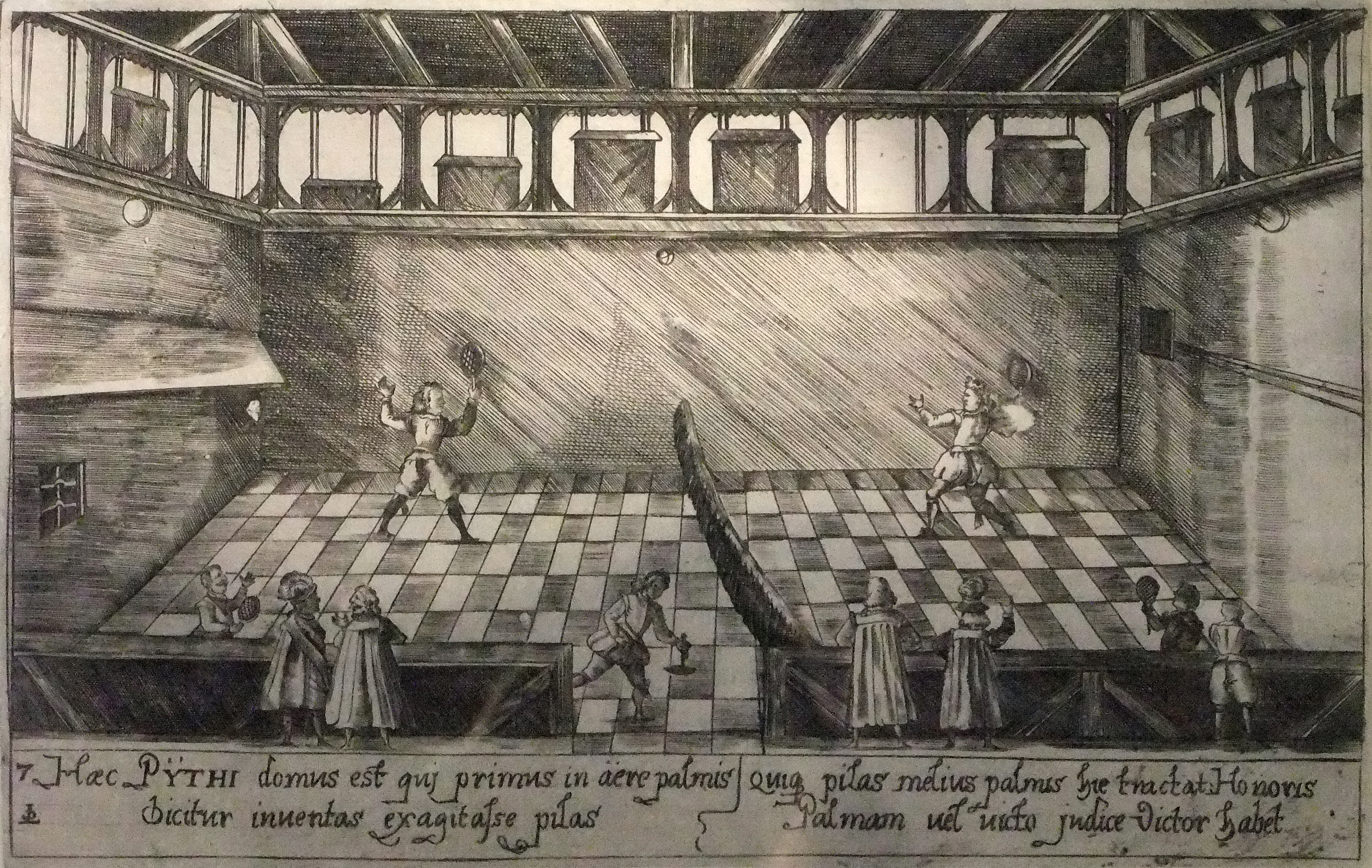 Collegium Illustre. Tennisspiel (Radierung; Stadtmuseum Tübingen Inv. 1087)